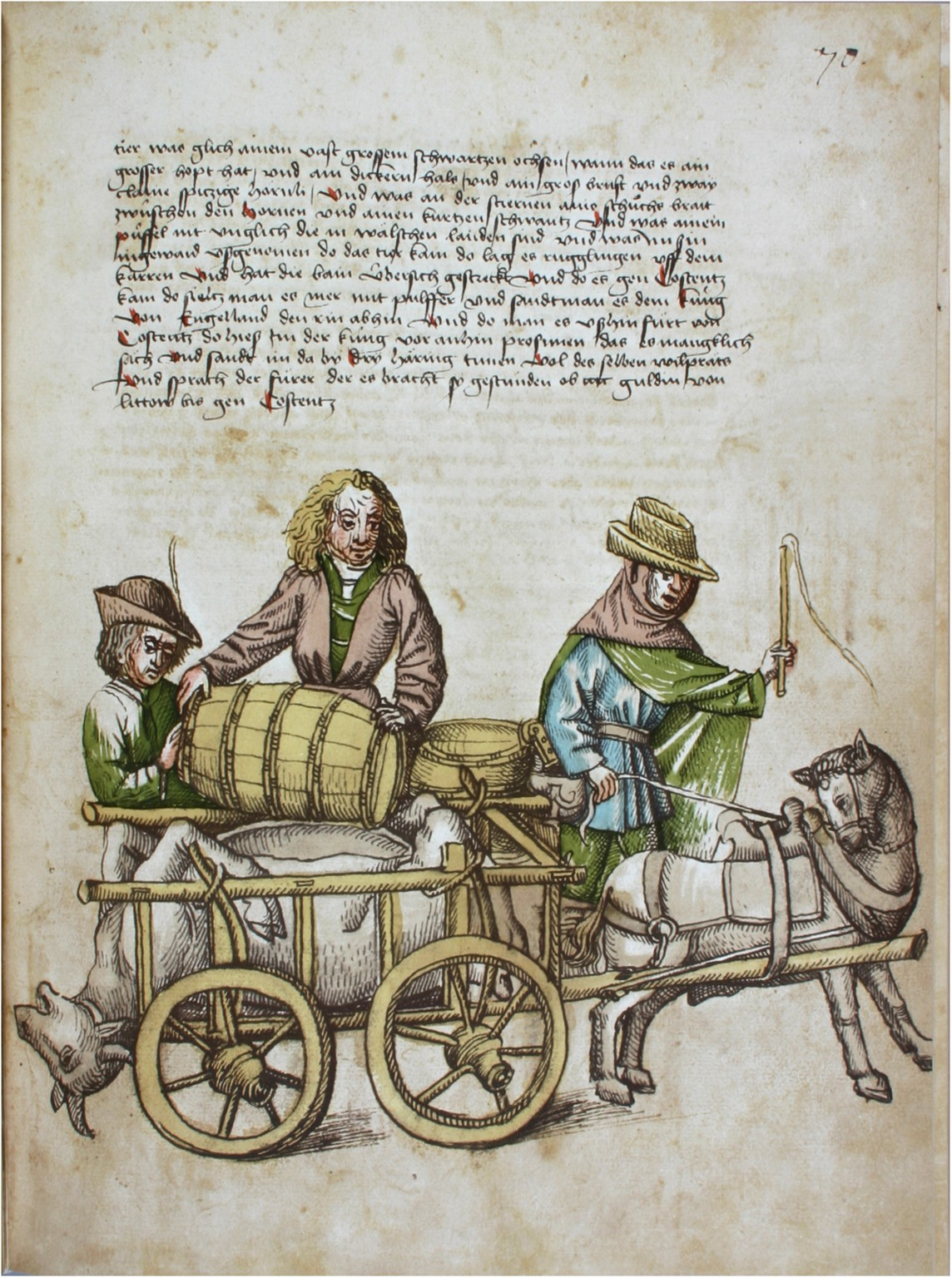 Rosgartenmuseum Konstanz, Hs. 1, Richental: Konzilschronik. In: Feger, Otto (Bearb.): Ulrich Richental: Das Konzil zu Konstanz. Faksimile. Starnberg - Konstanz 1964. Fol. 70r